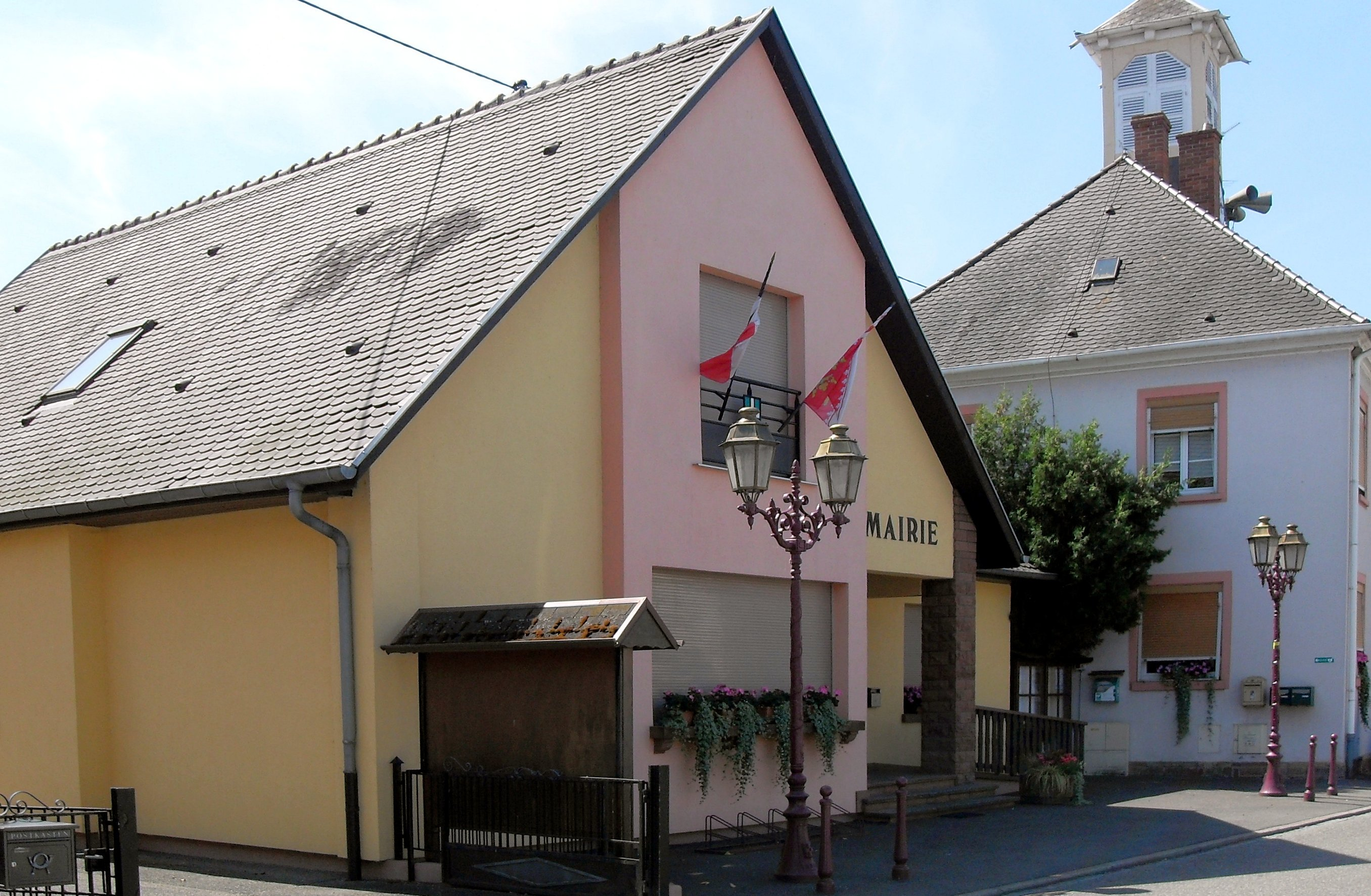 La mairie de Stattmatten